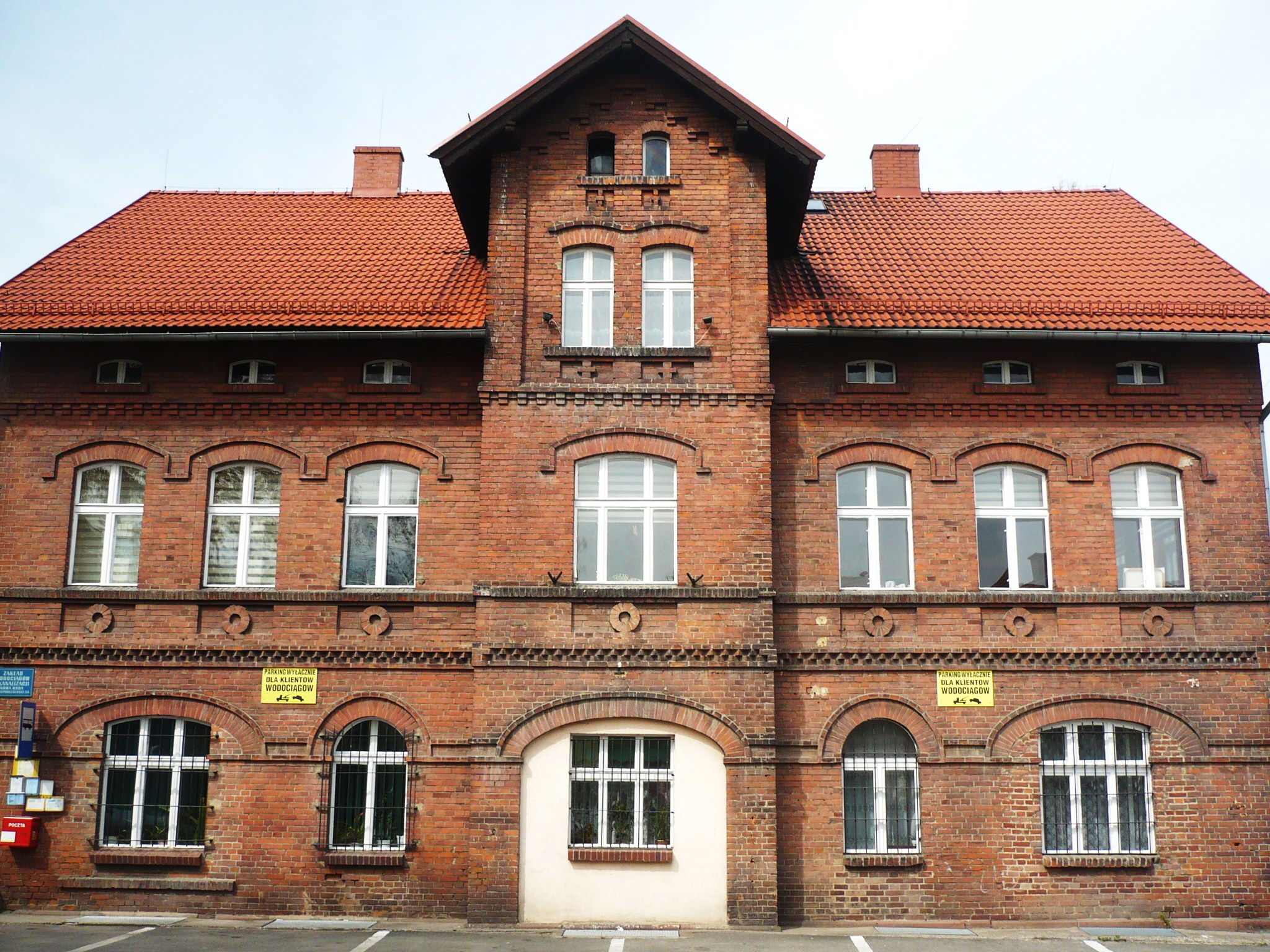 Nowa Ruda. ZWiK